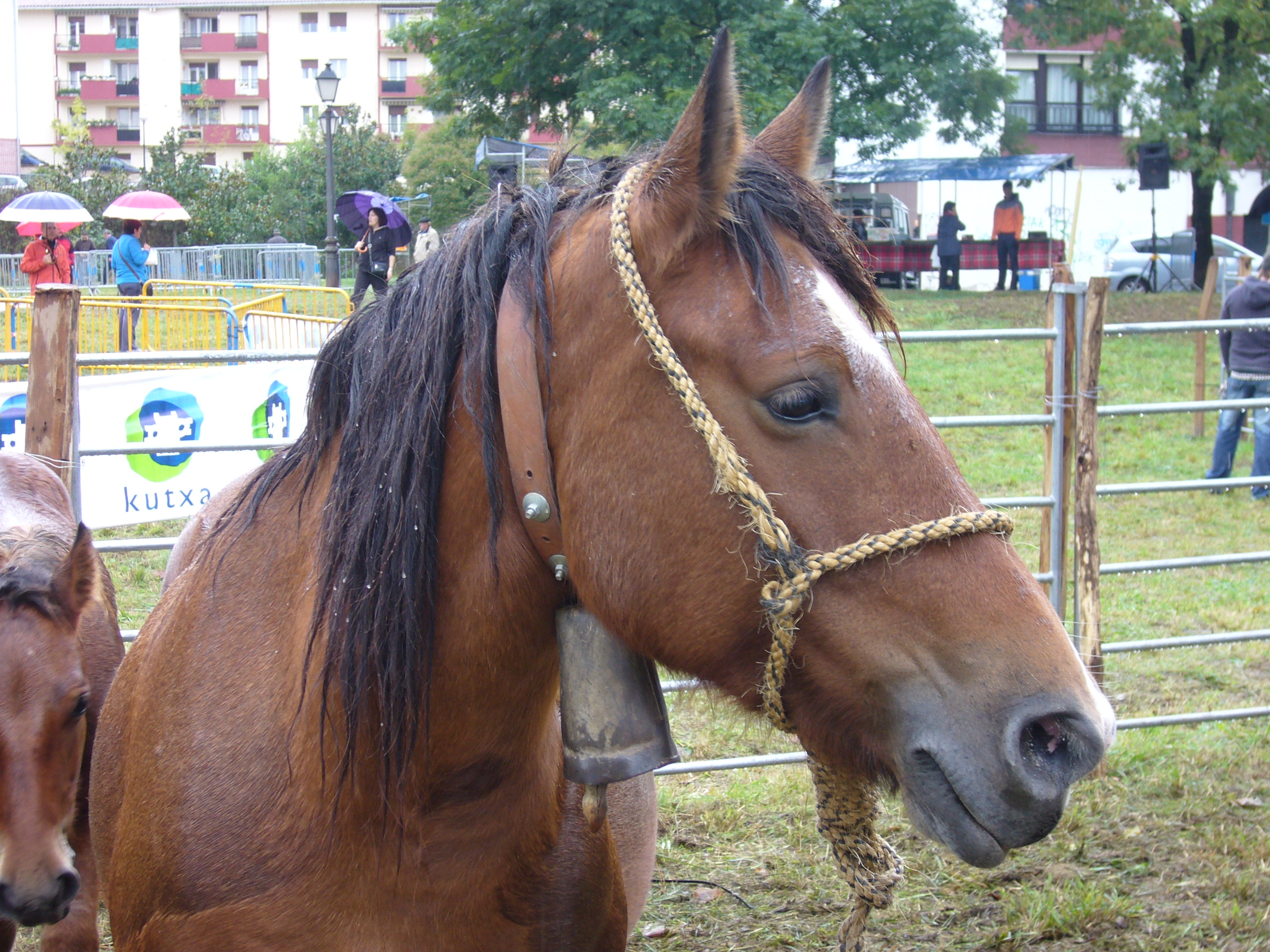 Nafar behoka, Ormaiztegiko azokan 2010.°